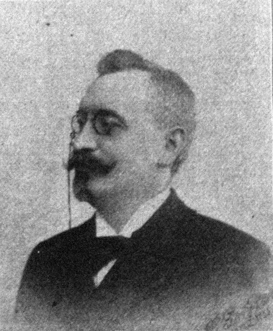 Österreichischer Politiker, Reichsratswahl 1907, Name siehe Dateiname